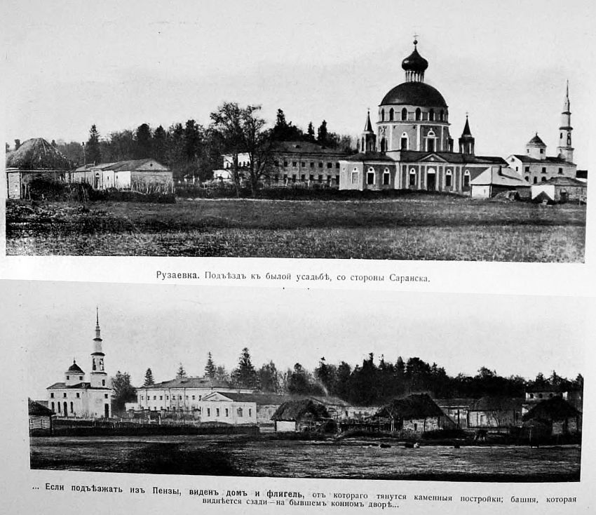 Усадьба Струйских. Вид со стороны Пензы. Фото 1886 года.